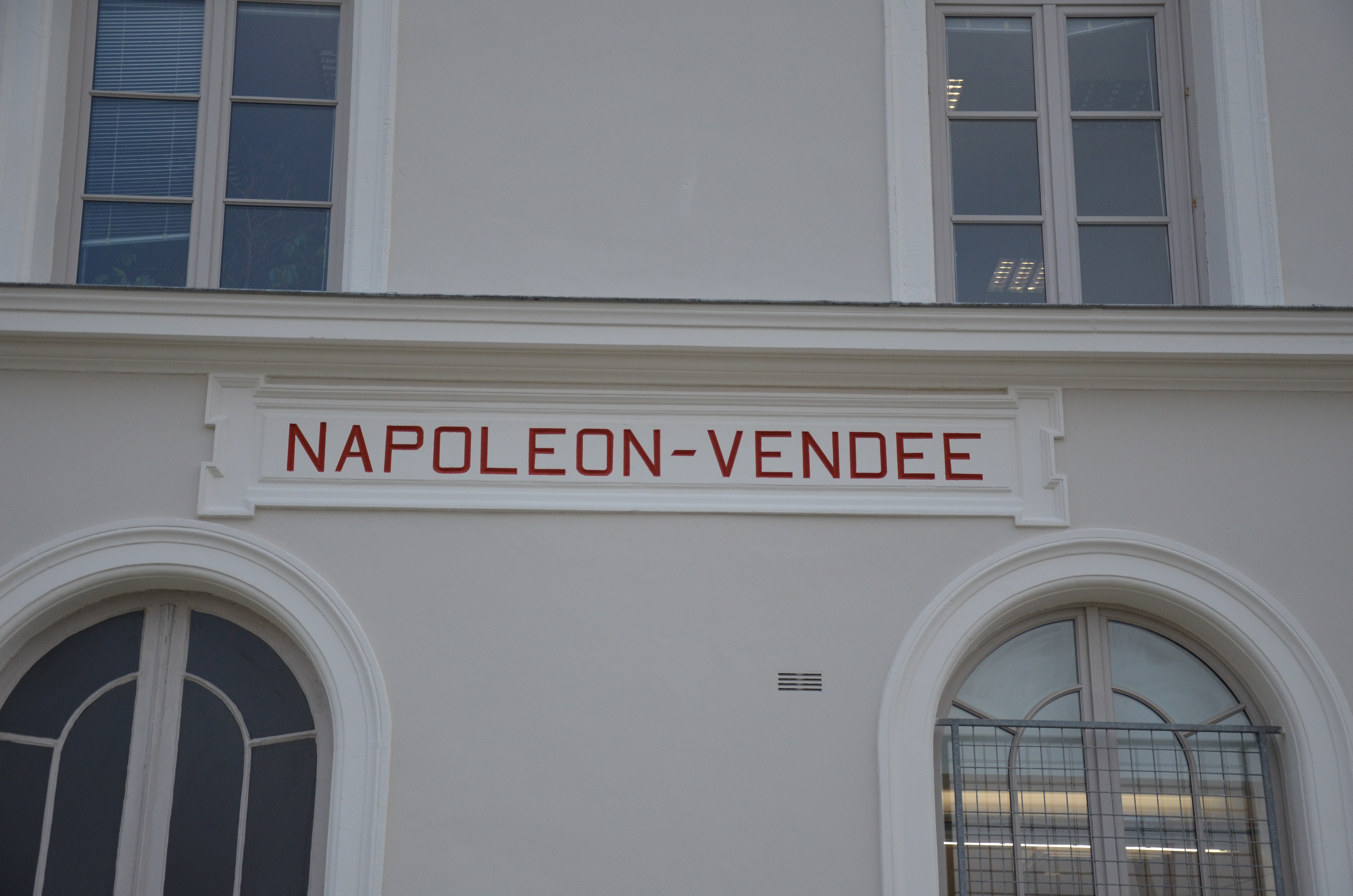 Inscription "Napoléon-Vendée" sur le bâtiment voyageurs de la gare de La Roche-sur-Yon. Il s'agit du nom original de la gare donné en 1866.